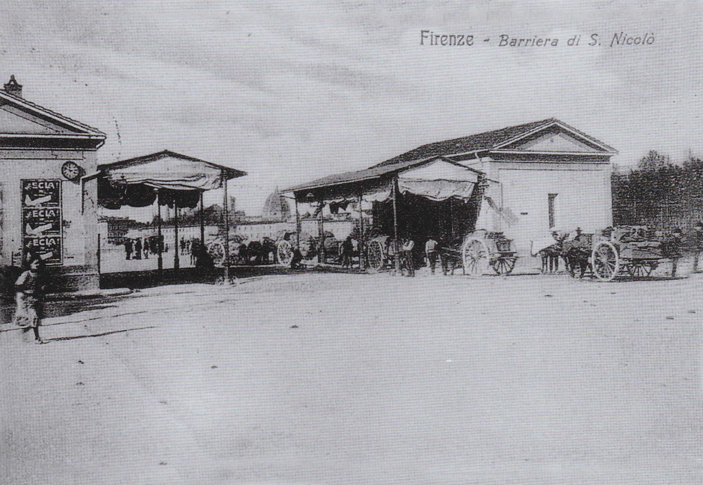 Barriera daziaria di San Niccolò (Firenze)